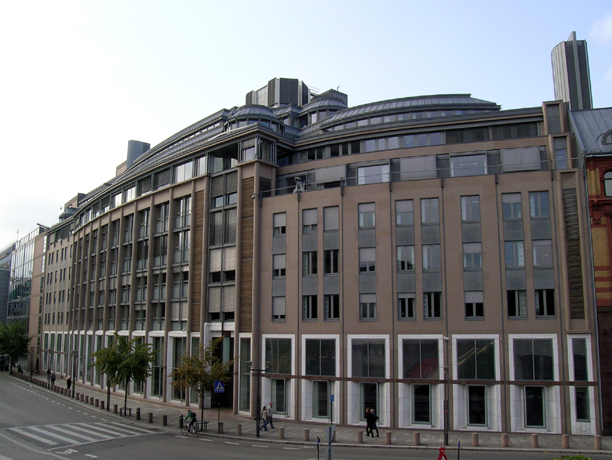 Akersgata 59, Oslo, Norway. Government offices: Barne- og familiedep., Arbeids- og adm.dep., Landbruksdep., Samferdselsdep., Kulturdep. Erected 1994-1996. Architect: Torstein Ramberg AS.